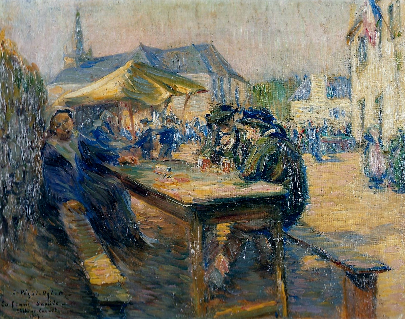 Jean-Bertrand Pégot-Ogier : La femme saoule. Clohars-Carnoët (1907)